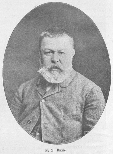 Михаил Яковлевич Виллие (1838—1910) — русский художник акварелист, действительный член Императорской Академии художеств.